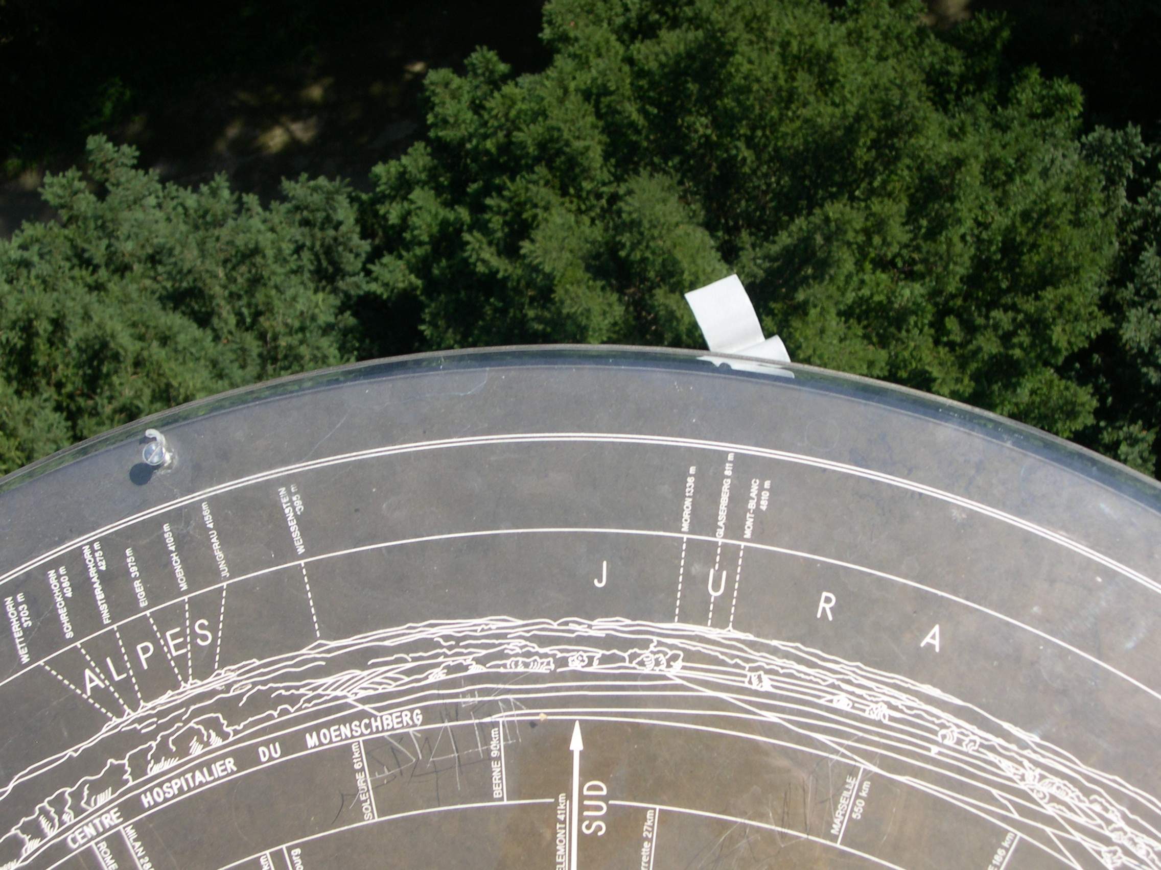 Table d'orientation (Sud) située sur la plate-forme - alt 352 m- , de la tour panoramique. La partie sommitale du Mont-Blanc est le seul sommet des Alpes françaises observable.